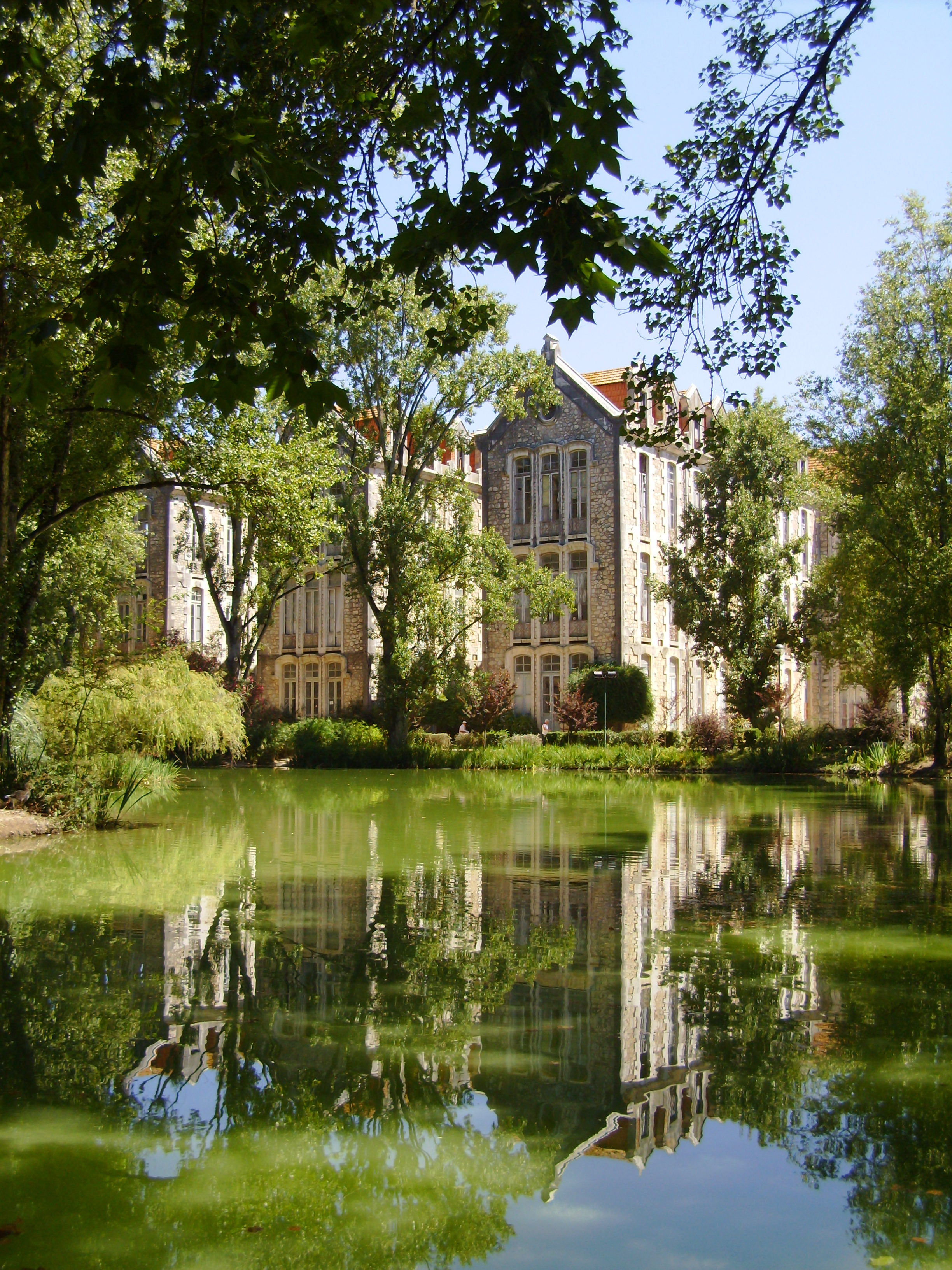 Parque D. Carlos I, Caldas da Rainha, Distrito de Leiria, Portugal: pavilhões.